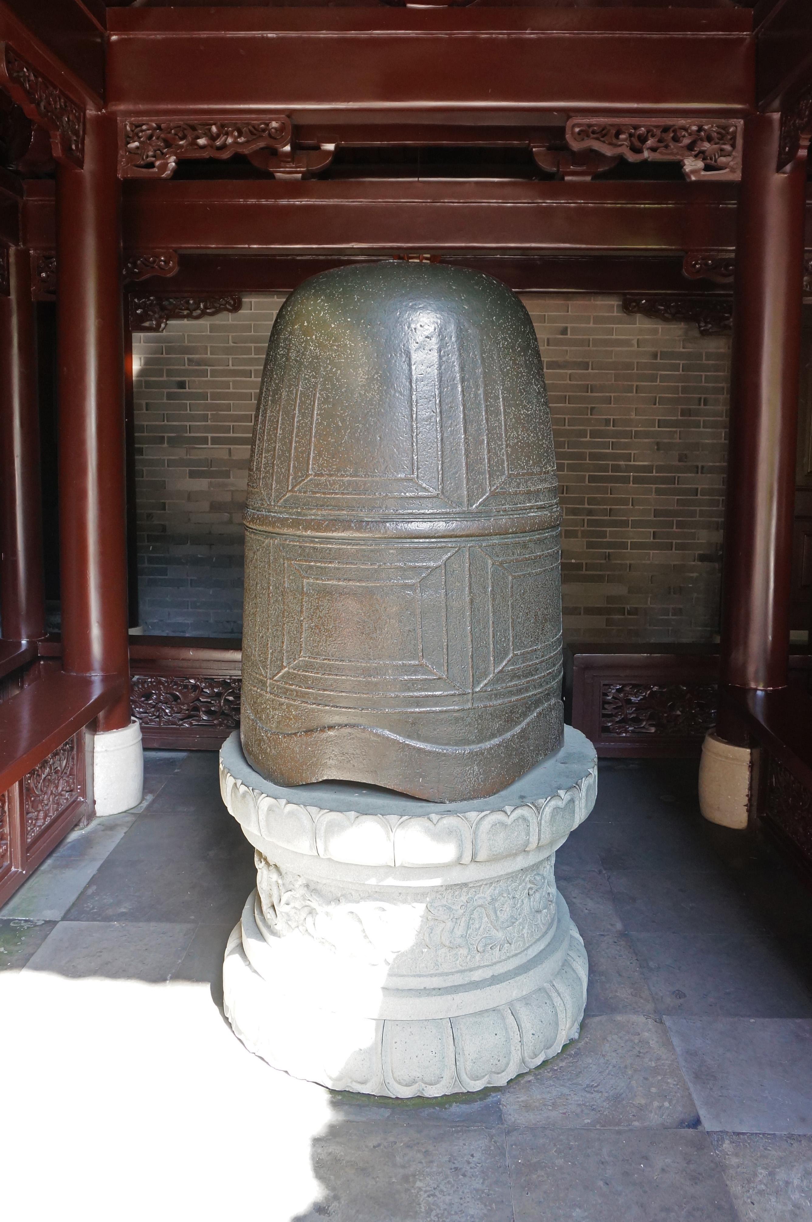 温州妙果寺，猪头钟。